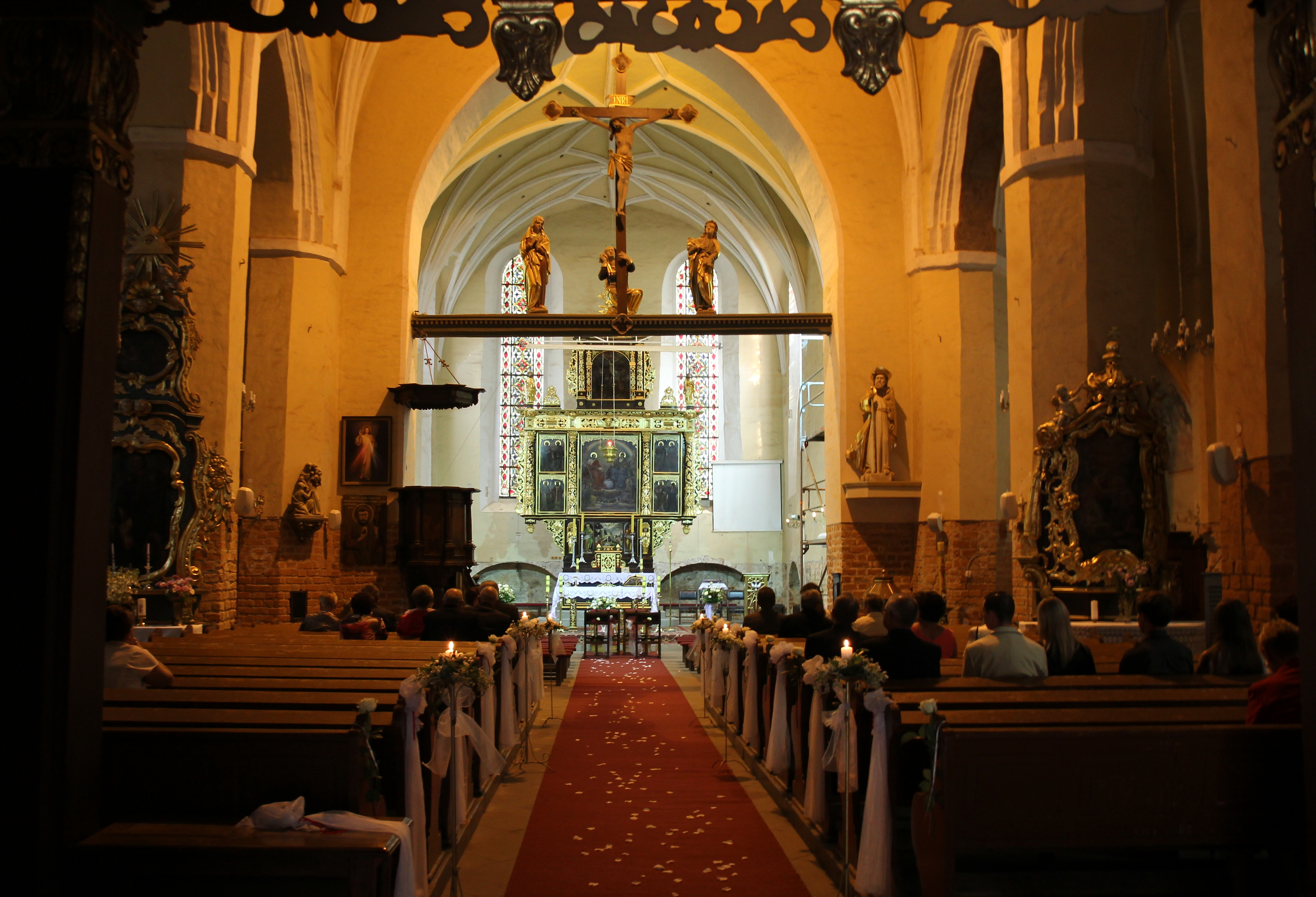 Wągrowiec, ul. Klasztorna 4 - kościół parafialny pw. św. Jakuba Apostoła z 3. ćw. XV w., 2 poł. XVI (zabytek nr Ak-I-11a/260)